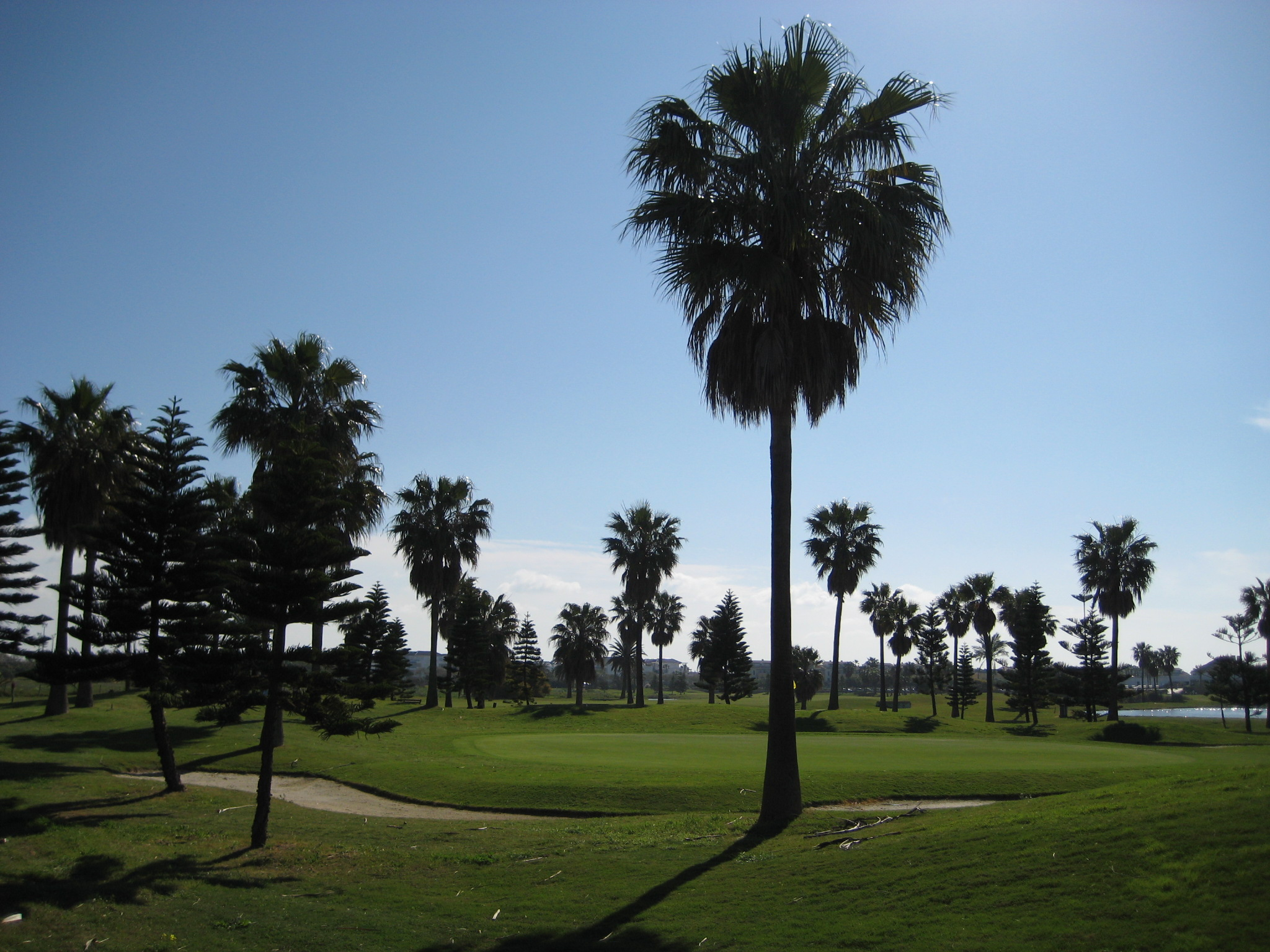 Fotografia del campo de golf de Costa Ballena, Rota (España)